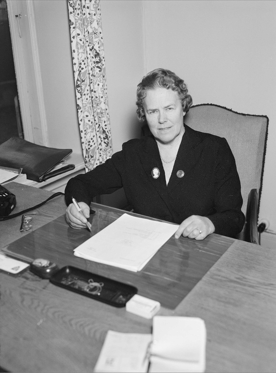 Alette Marie Engelhart (født Nicolaysen 7. mai 1896, død 13. august 1984) var en norsk lærer og organisasjonskvinne. Hun var leder i Norges husmorforbund 1946–59, leder i det Nordiske husmorforbundet 1956-60, formann i FN-sambandet 1948–52 og aktiv i flere andre organisasjoner.